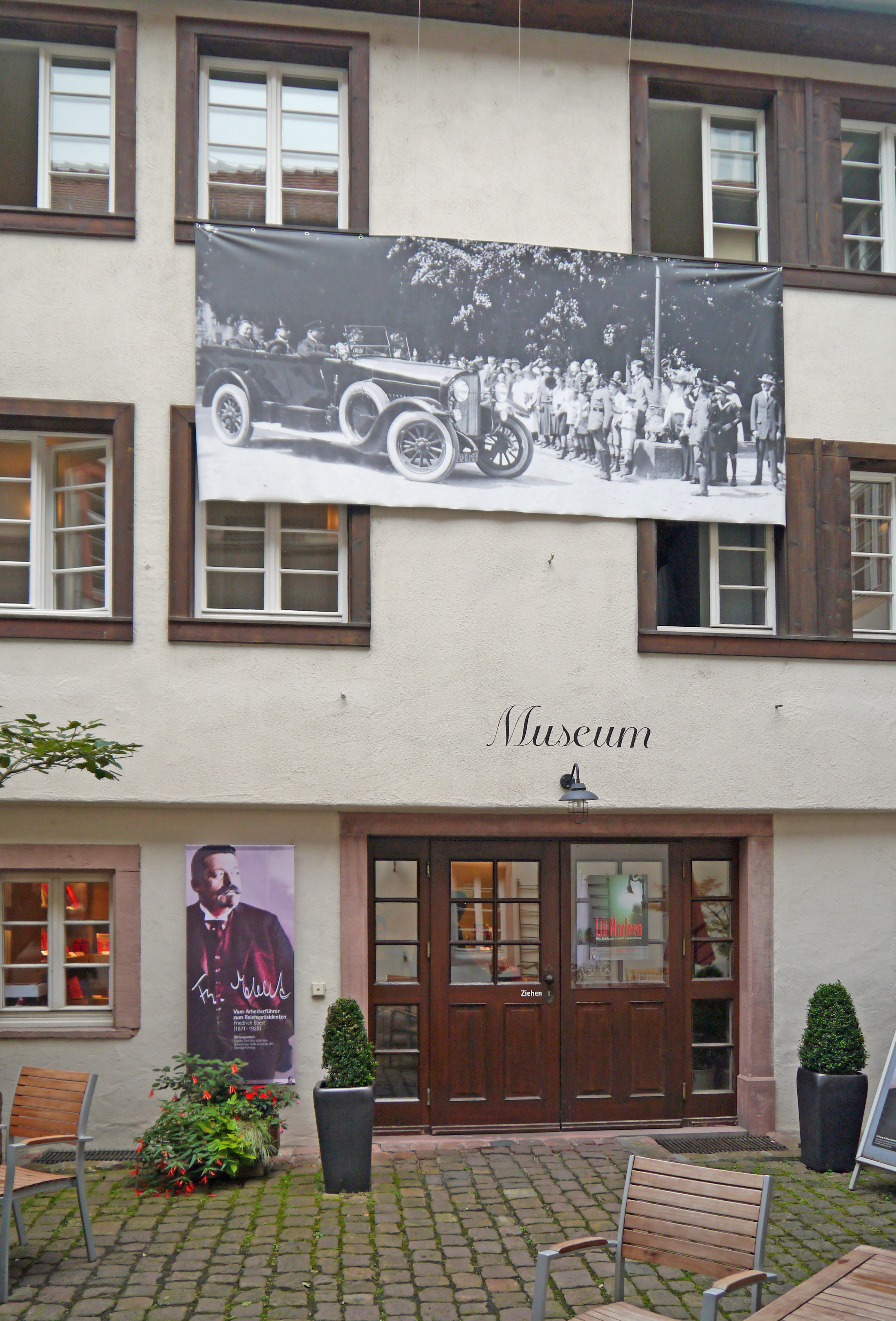 Stiftung Reichspräsident-Friedrich-Ebert-Gedenkstätte, 2012 in der Pfaffengasse 18 in Heidelberg.